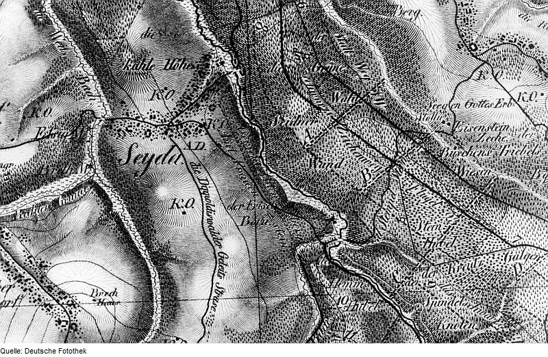 Original image description from the Deutsche FotothekHermsdorf/Erzgeb.-Seyde. Oberreit, Sect. Altenberg, 1821